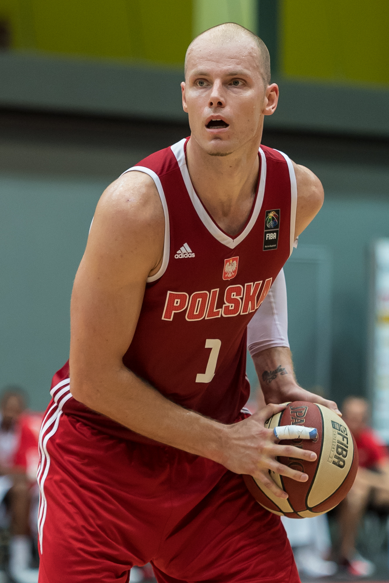 ÖBV Vier-Nationen-Turnier vom 12.-14. August 2016 in Schwechat - Österreich vs Polen. Bild zeigt Maciej Lampe (POL).